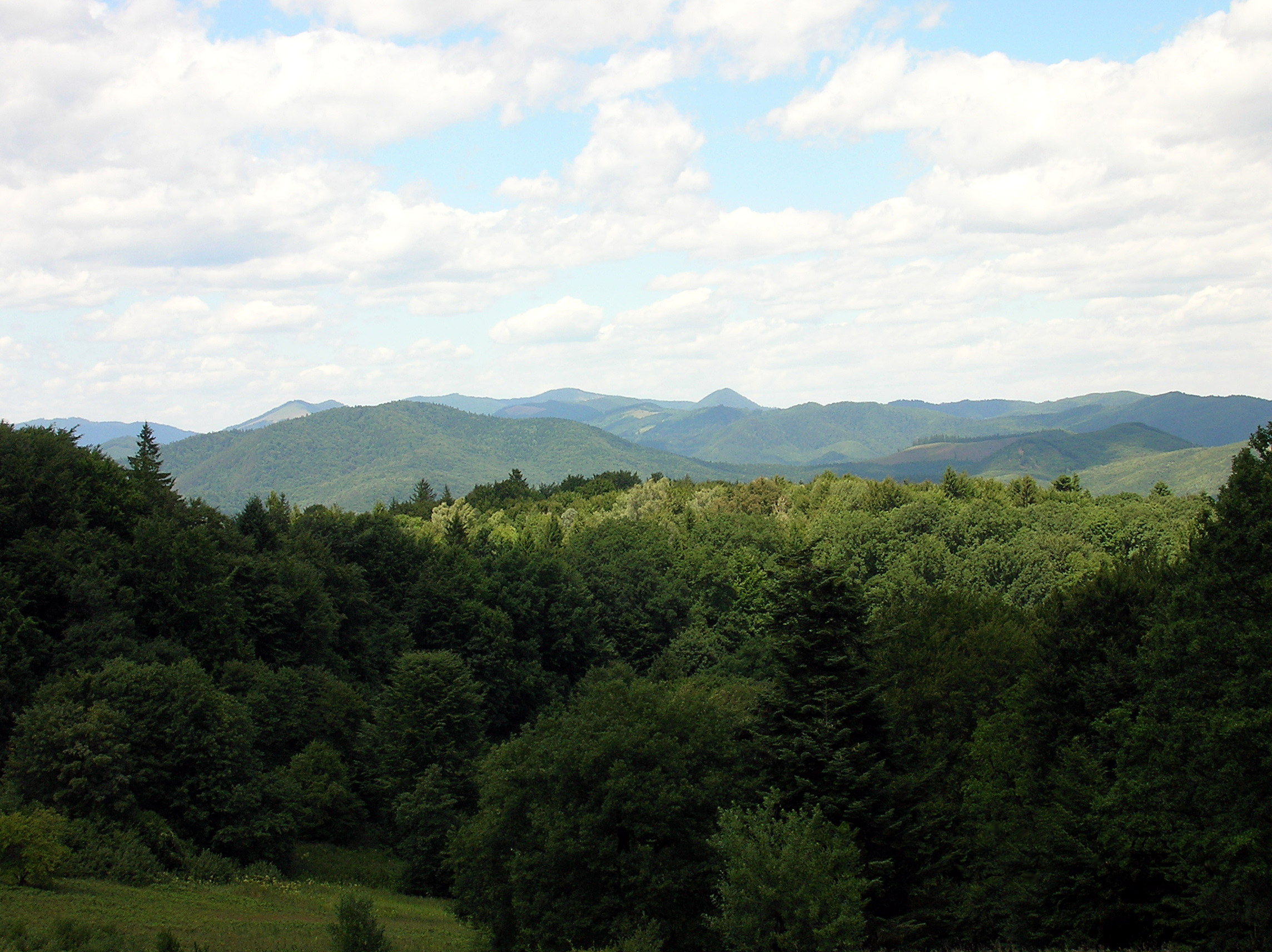 Munţii Tarcăului (Carpaţii Orientali, România)-Spre "vecini" (Munţii Stânişoarei). Piscul ascuţit este probail Horaiţa